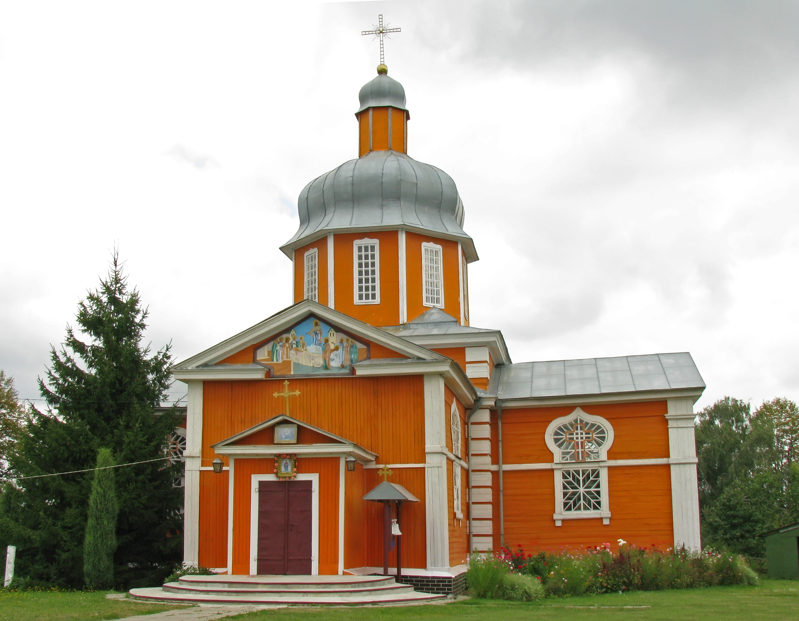 Церква Пречиста Богородиці (Успенська церква) (дер.), с. В’язівок